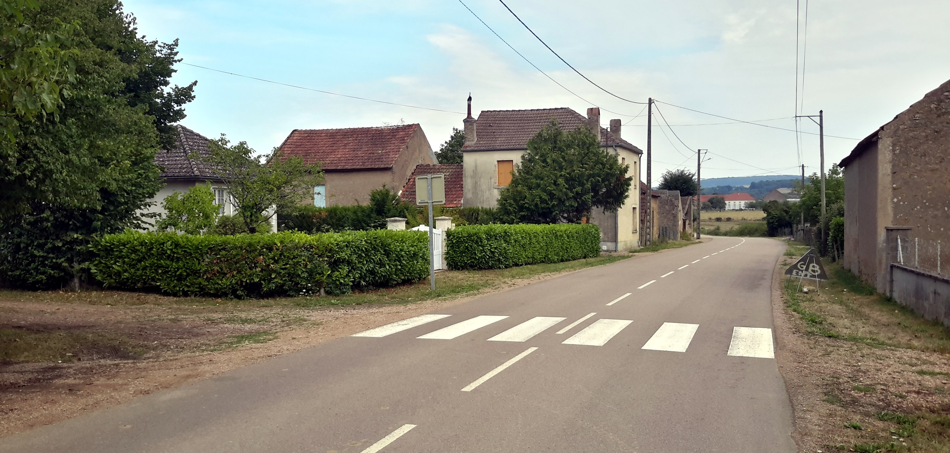 Route départementale 958 (ex RN 458), Magny-Lormes, Nièvre, France.